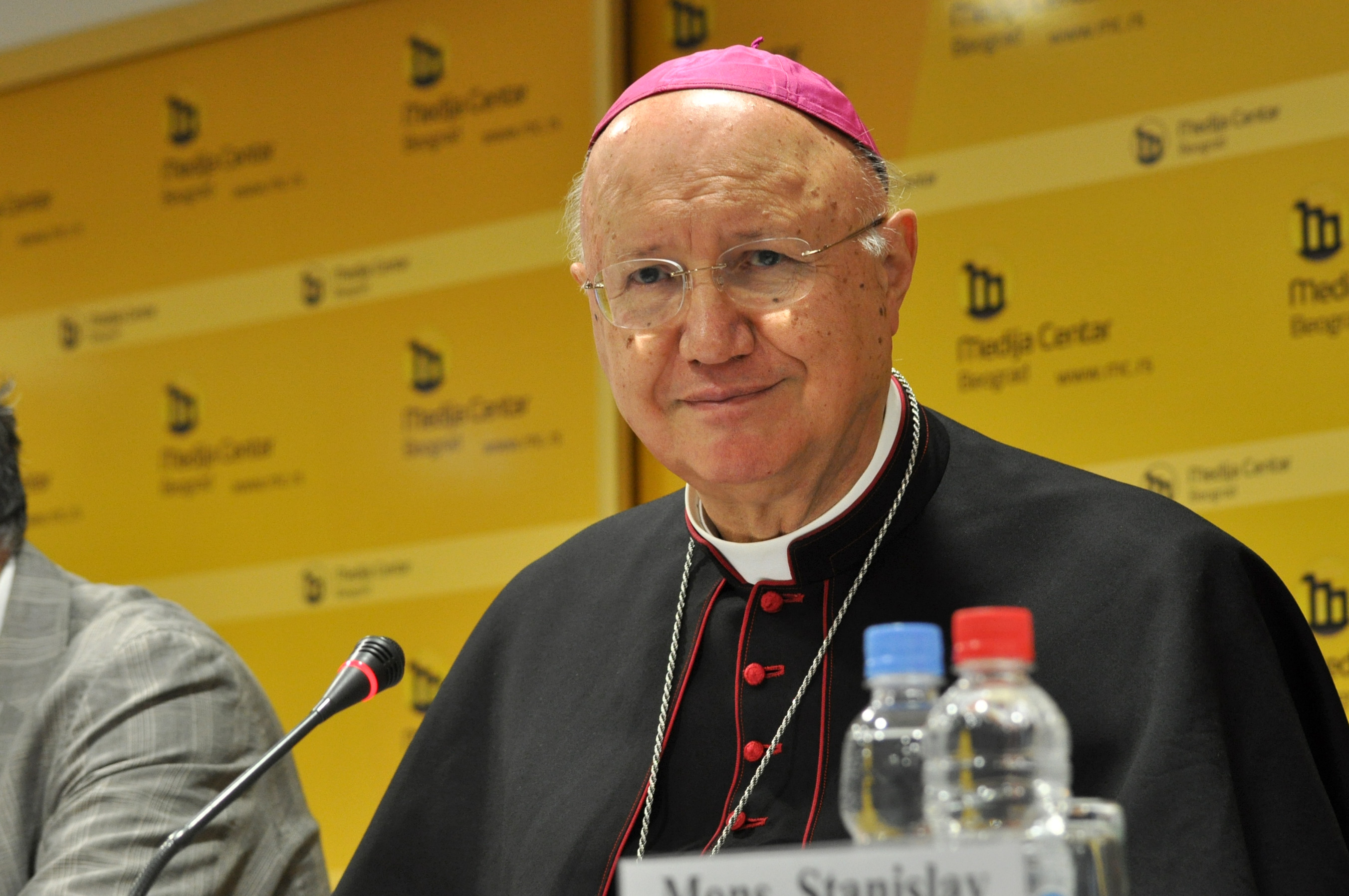 Клаудио Марија Чели...